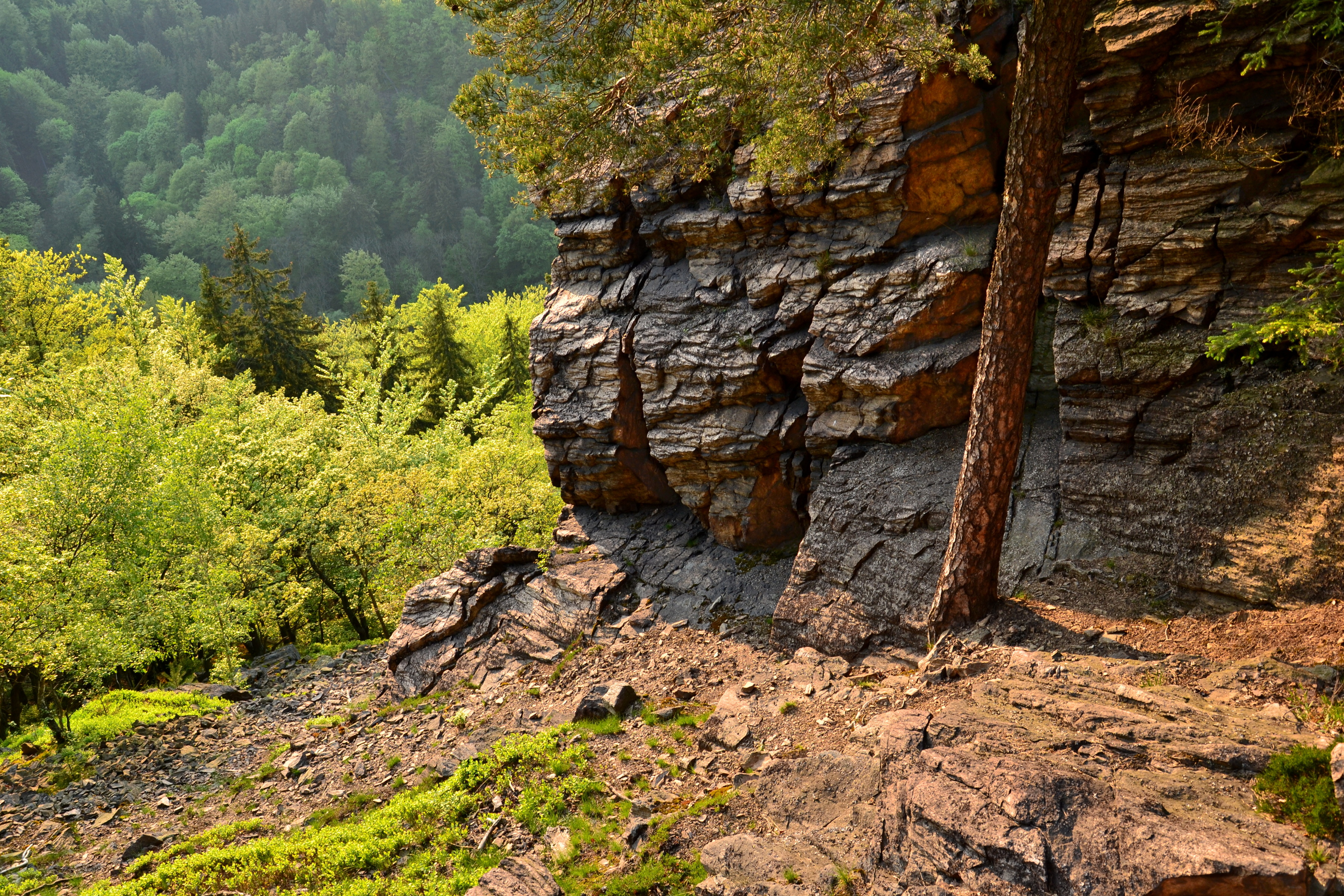 Suť pod vrcholovou skálou